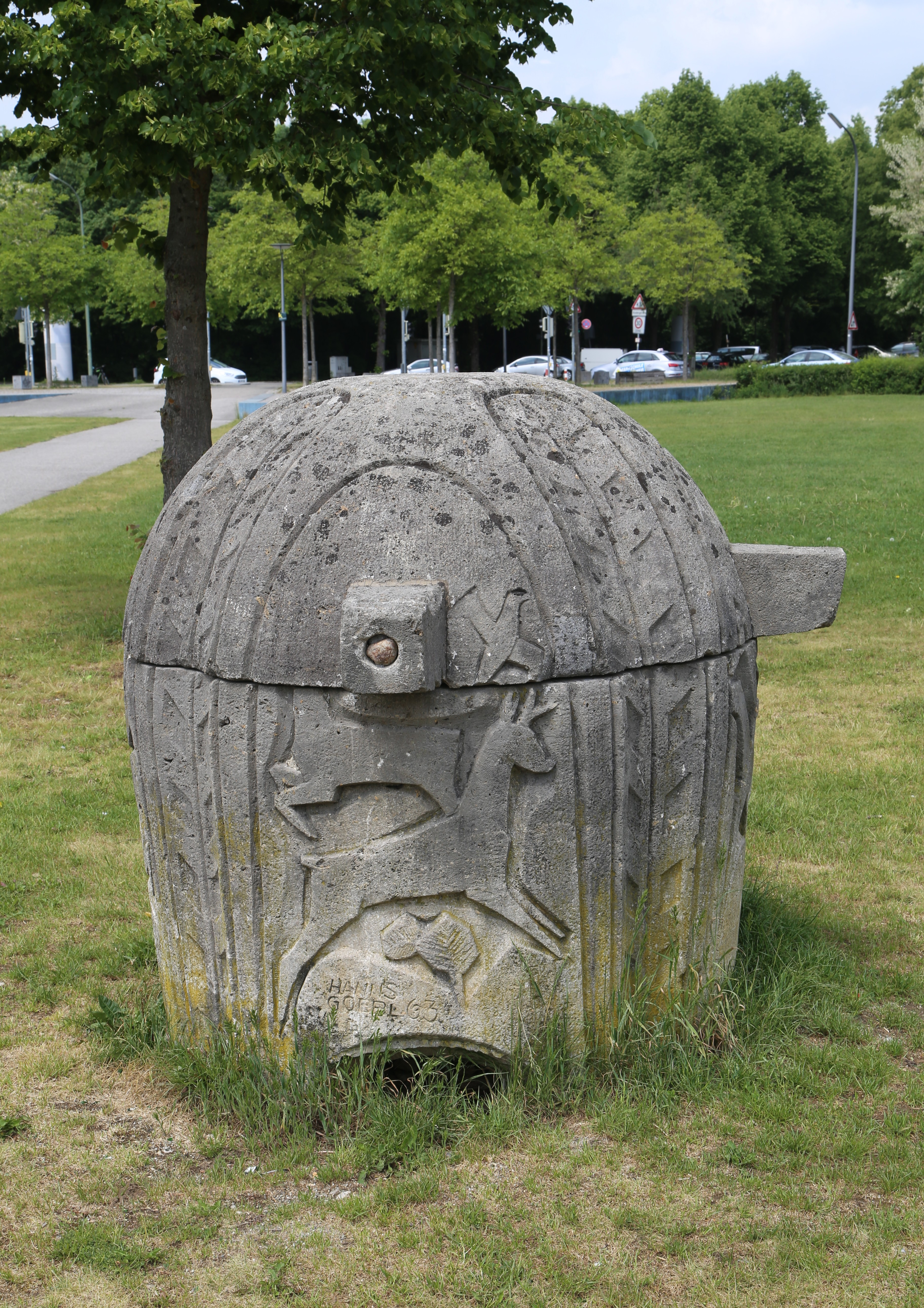 Goldschmiedplatz, Hasenbergl, München